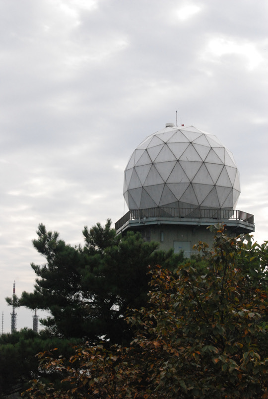 관악산 기상레이더 관측소